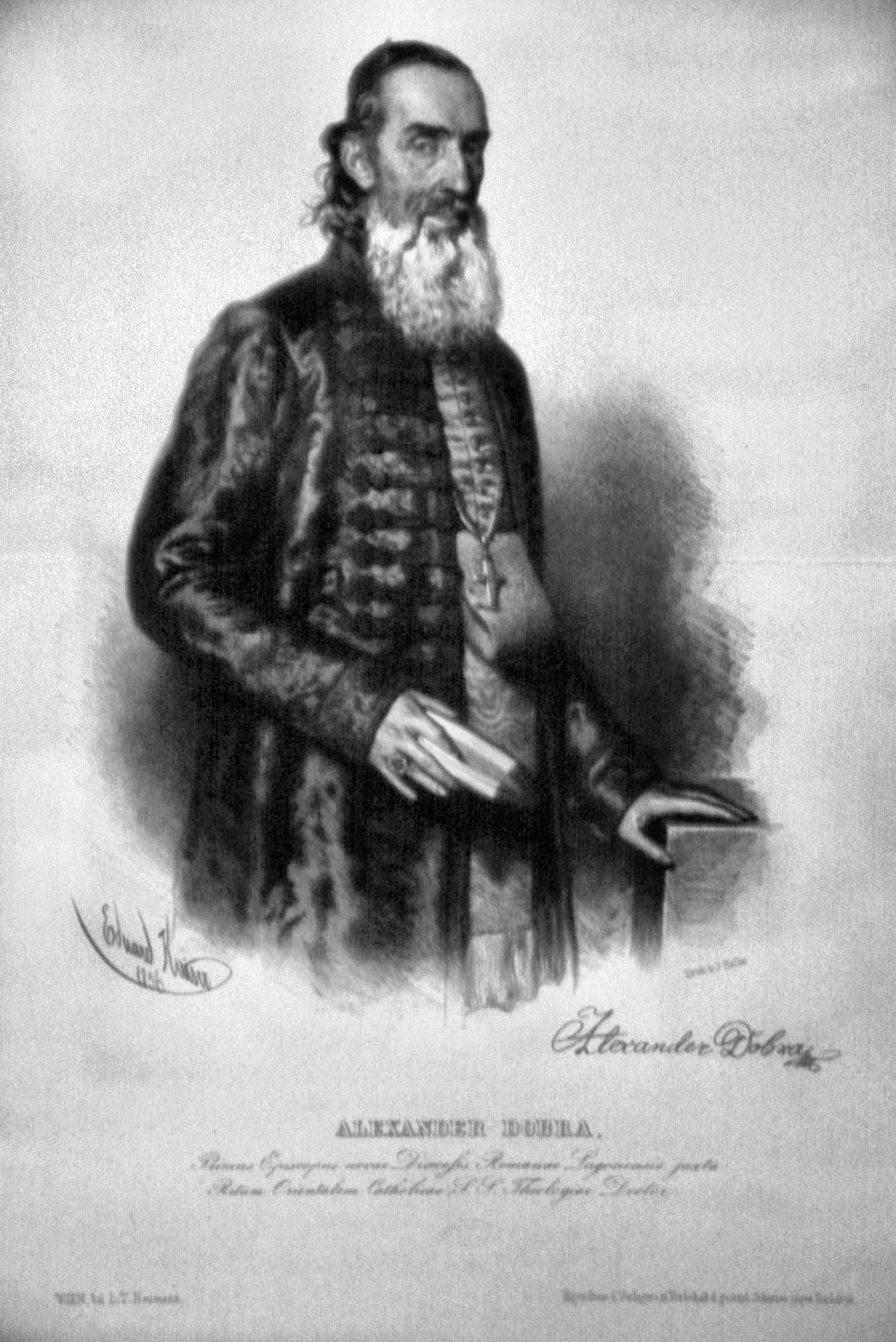 Alexander Dobra (1794-1870) rumänischer griechisch-katholischer Bischof von Lugoj. Lithographie von Eduard Kaiser, 1856.